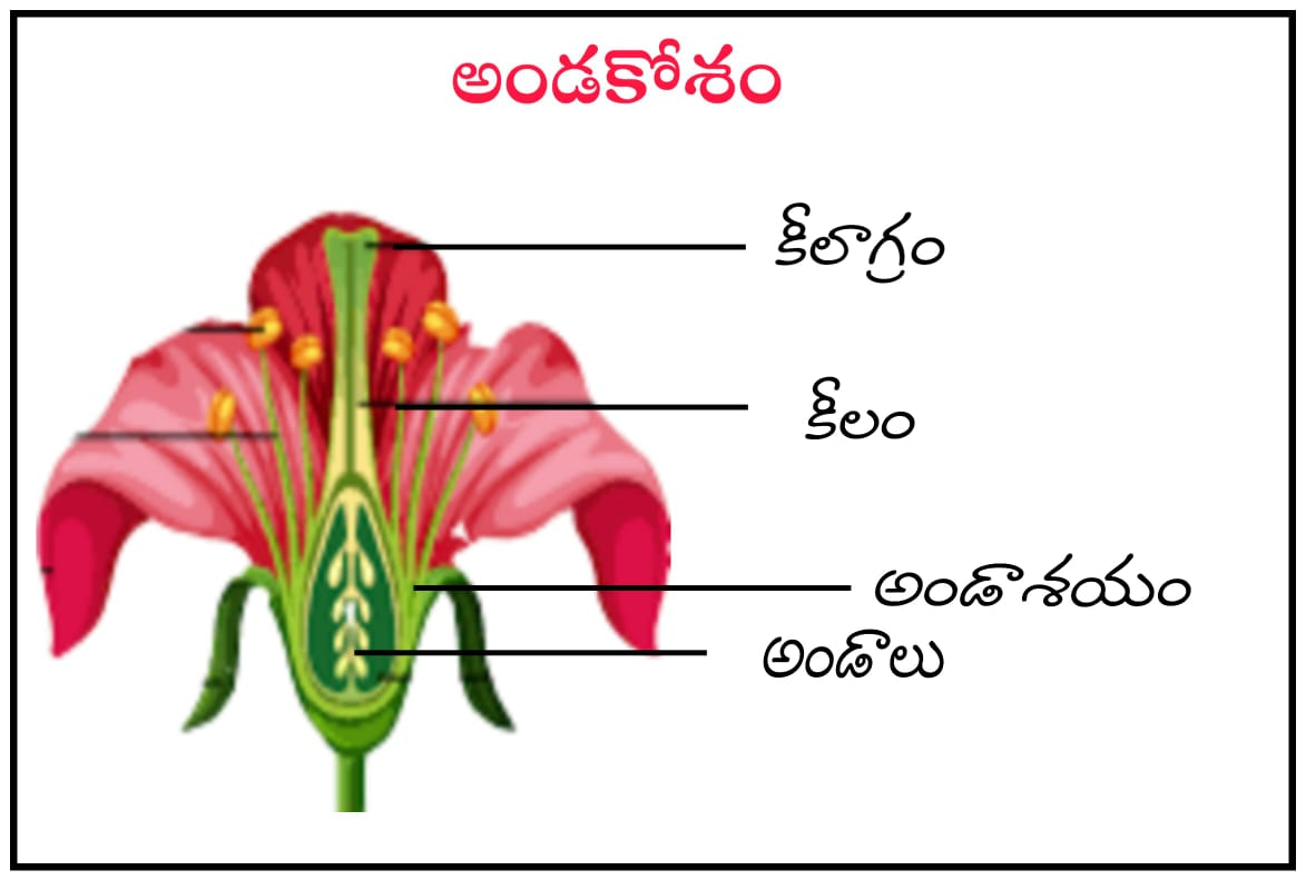 పుష్పభాగాలు